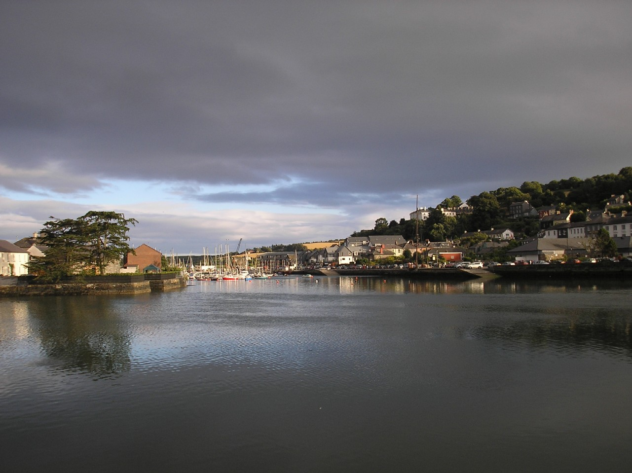 Puerto de Kinsale Taken by Valdoria. august 2006